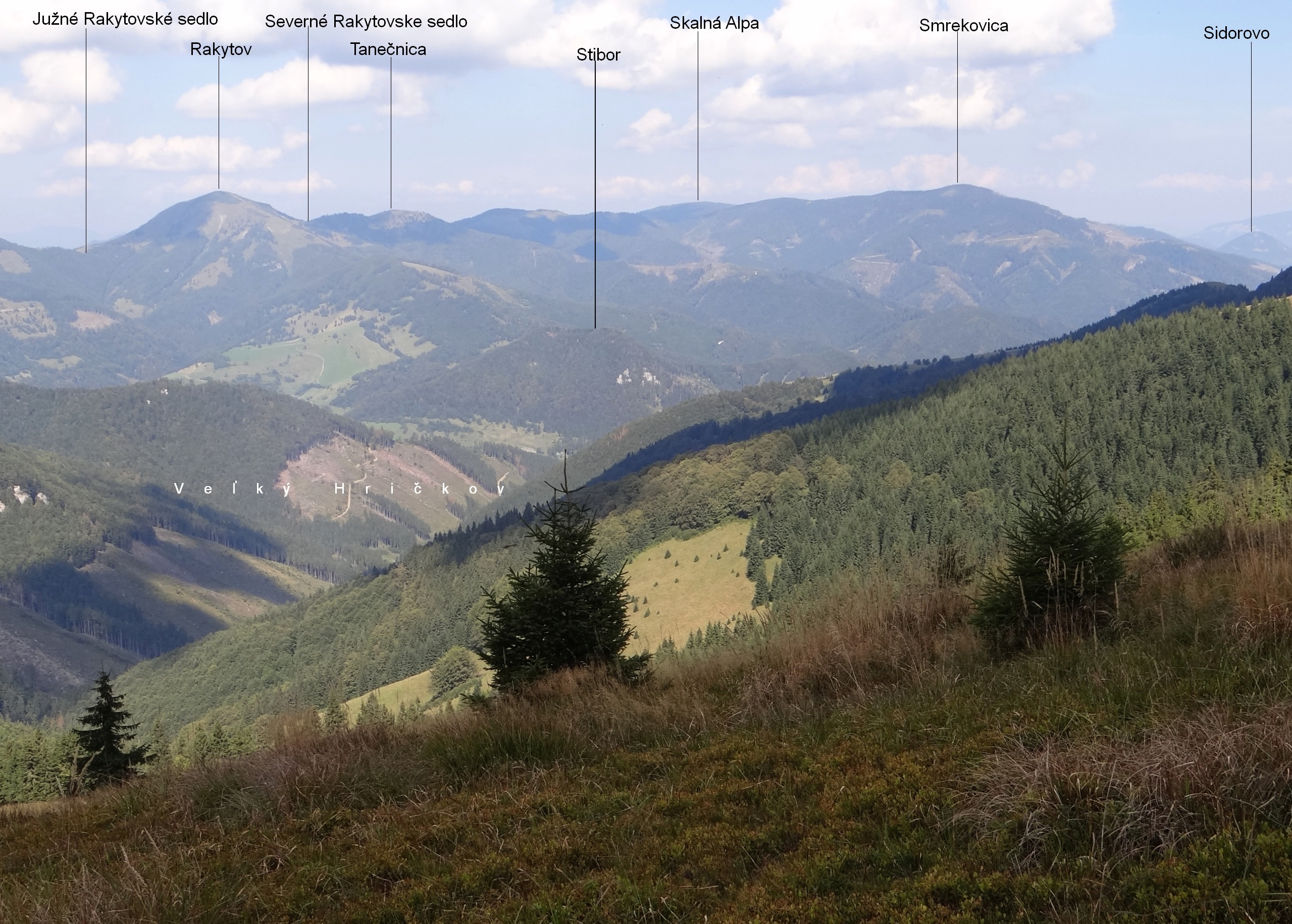 View from Zvolen